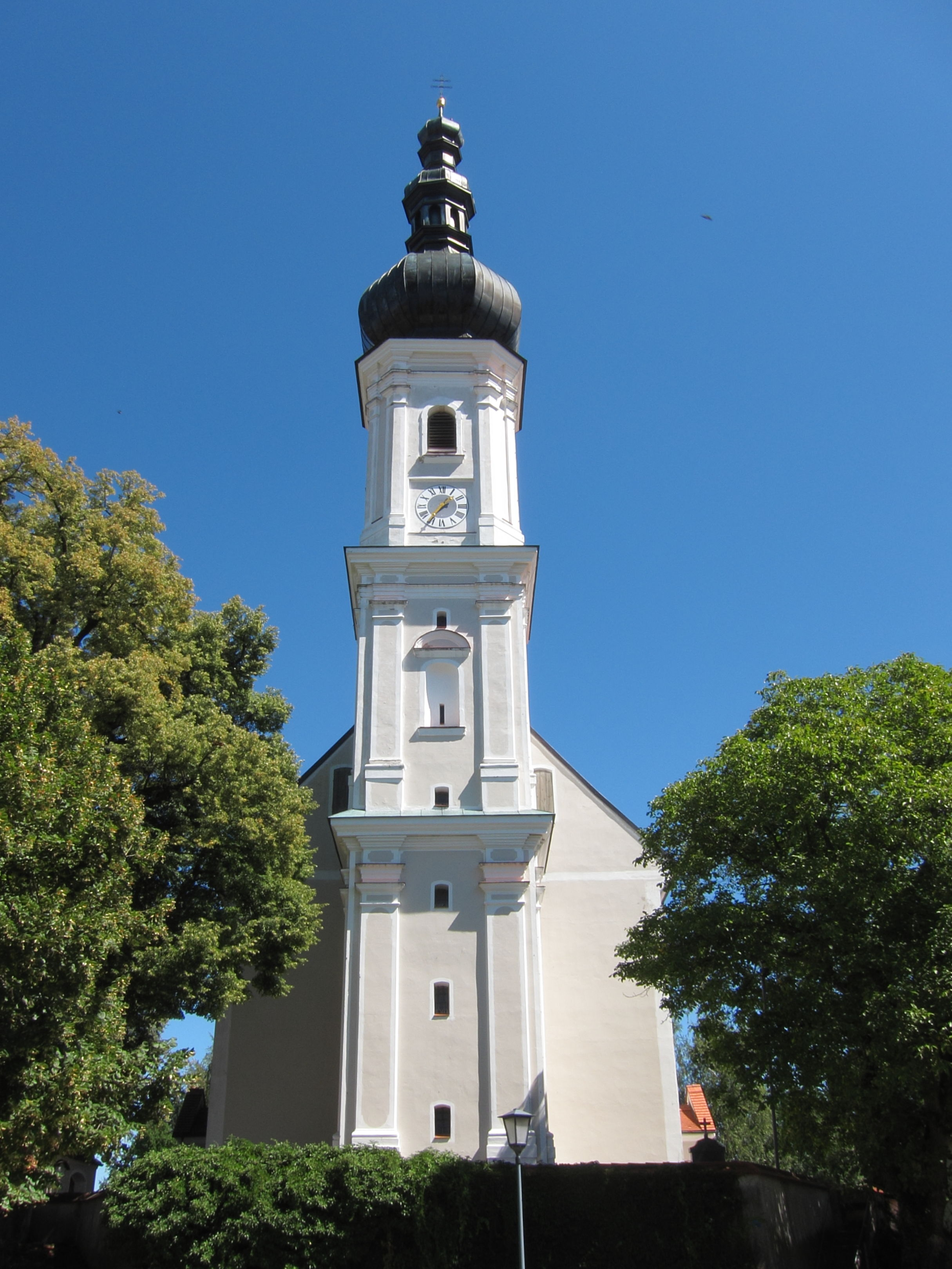 St. Johannes der Täufer; katholische Pfarrkirche, Saalbau mit eingezogenem halbrundem Chor und Spindelhelmturm, bedeutender barocker Bau von Anton Kogler, 1725-30, vollendet von Johann Baptist Lethner; mit Ausstattung.